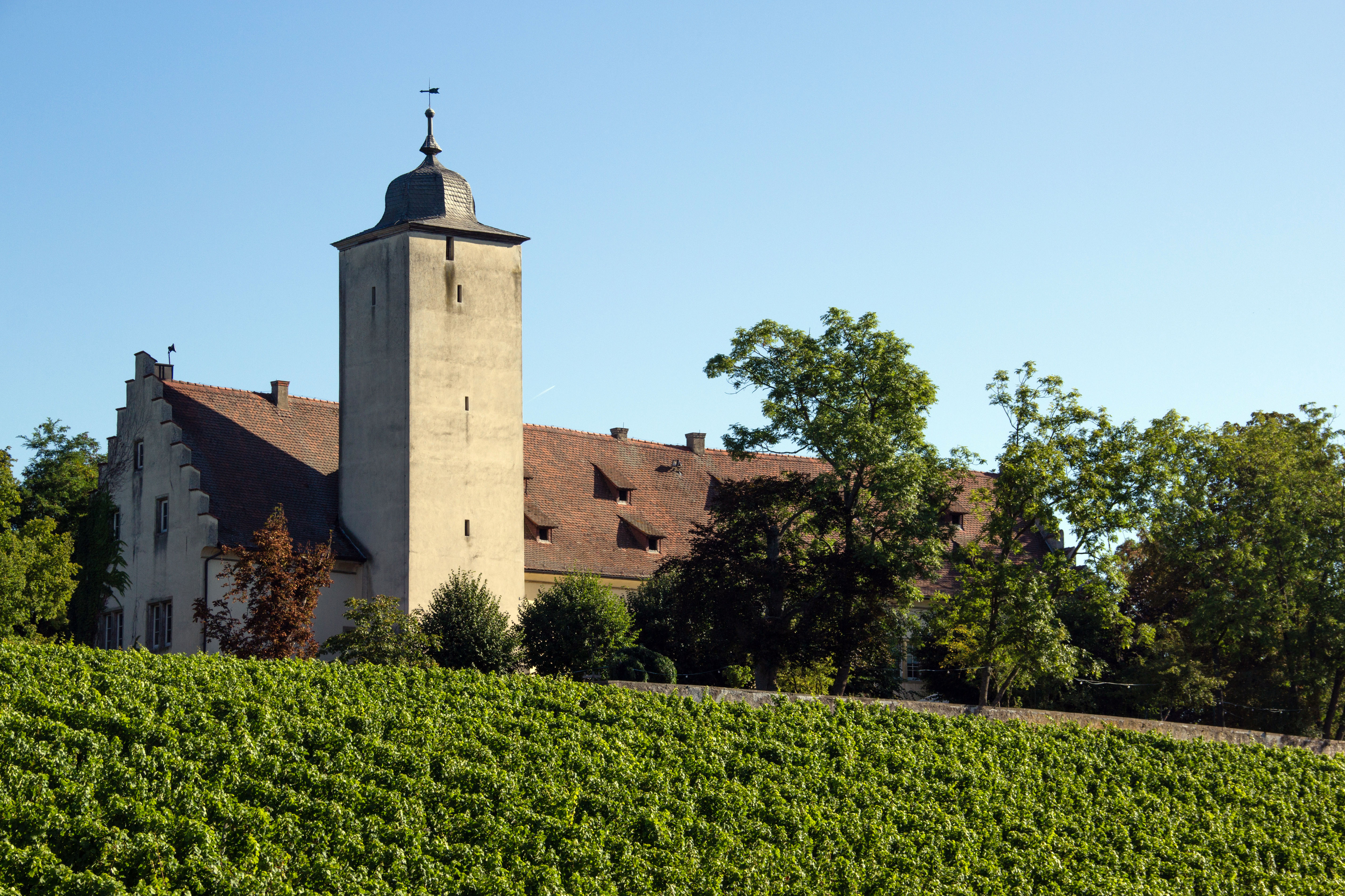 Burg Hallburg, Turm